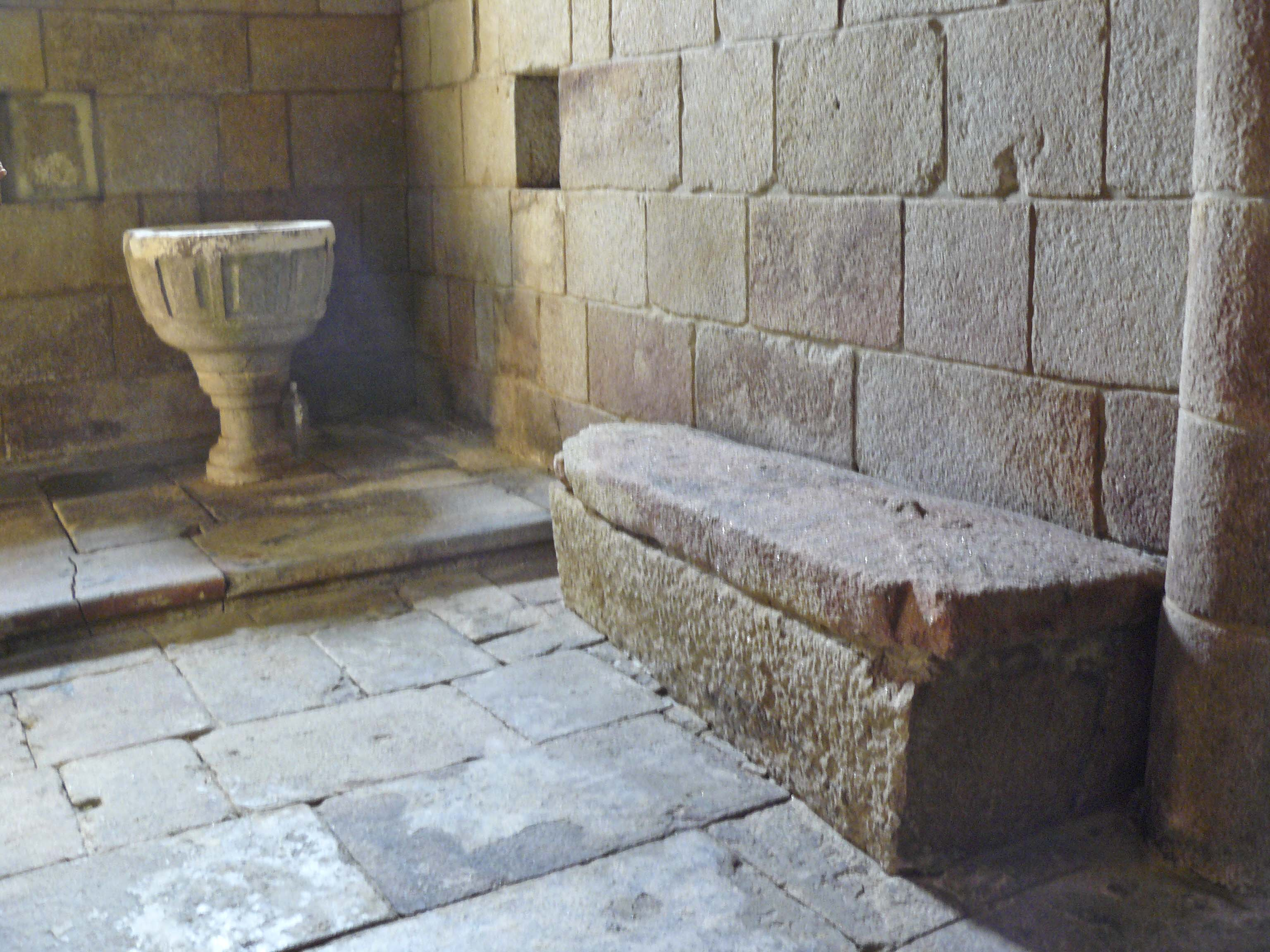 Lápida sepulcral2-Mosteiro de Aciveiro